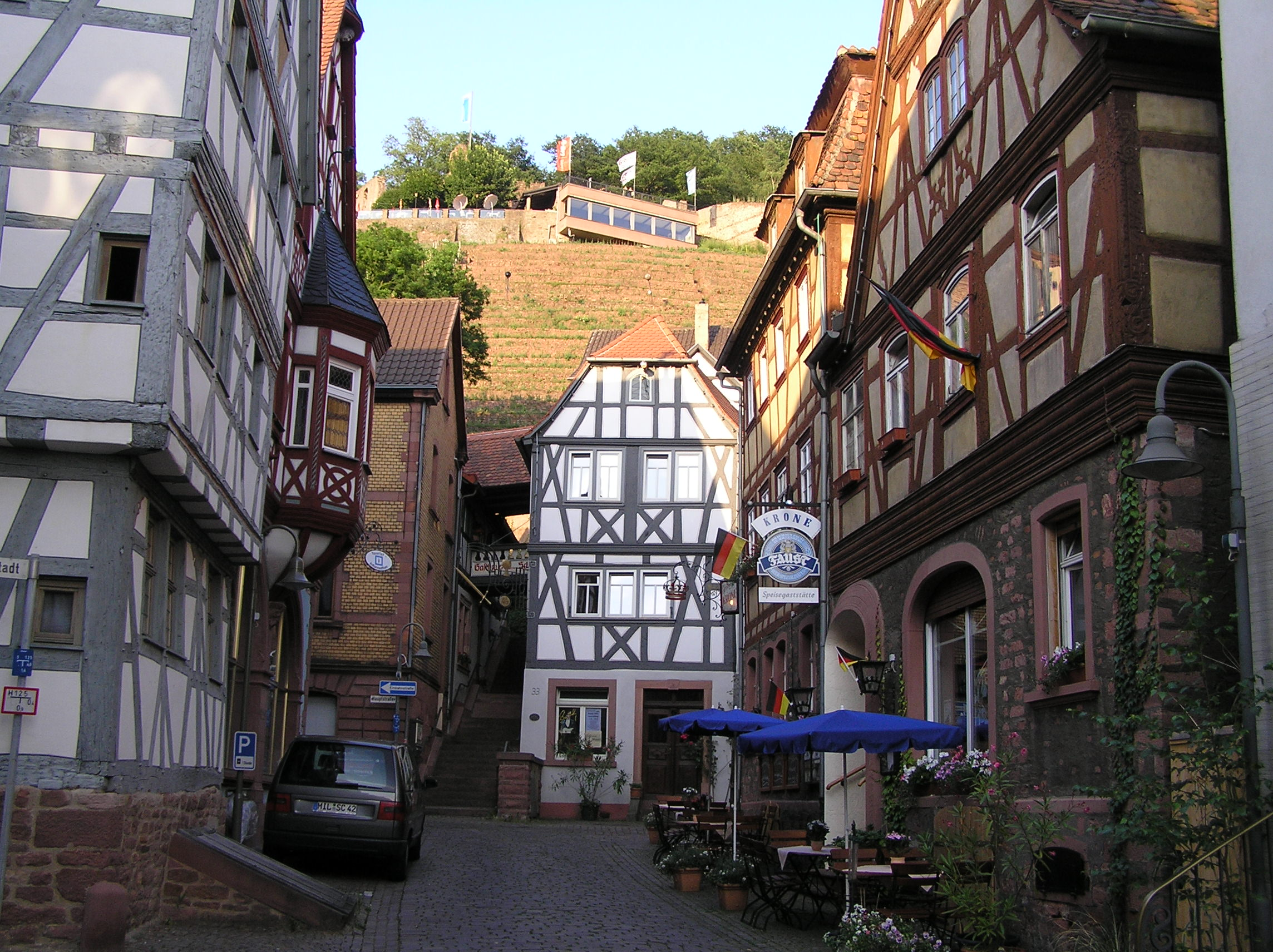 Die Gasthäuser Zum Schwert und Zur Krone in der Klingenberger Altstadt, im Hintergrund der Weinberg mit der Burgterrasse